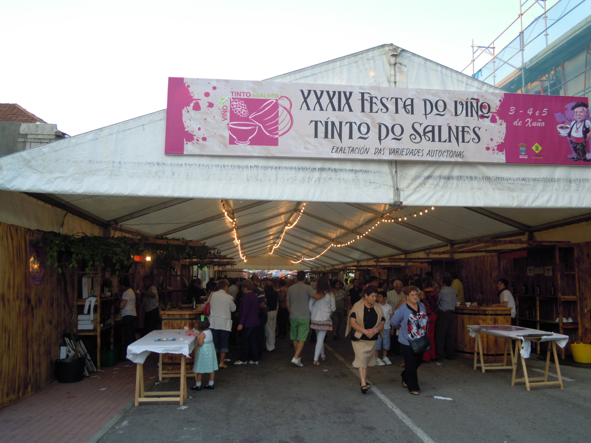 Carpa de degustación da XXXIX Festa do viño tinto do Salnés, en Barrantes (Ribadumia)